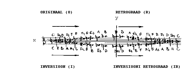 Rea neli kuju: Originaali (O) peegeldamisel horisontaaltelje suhtes, nii et peegeldustelg läbib originaali esimest heli, tekib rea inversioon (I); originaali peegeldamisel vertikaaltelje suhtes, nii et peegeldustelg läbib originaali viimast heli, tekib originaali retrograad (R); inversiooni peegeldamisel vertikaaltelje suhtes, nii et peegeldustelg läbib inversiooni viimast heli, tekib inversiooni retrograad (IR). x = horisontaaltelg, y = vertikaaltelg